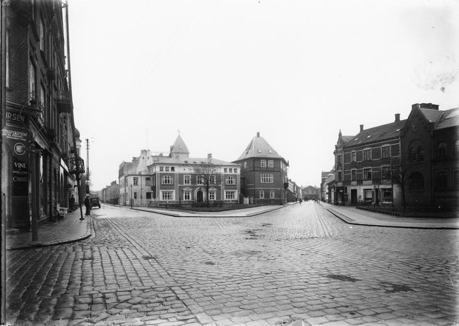 Skoletorvet i Silkeborg 1910